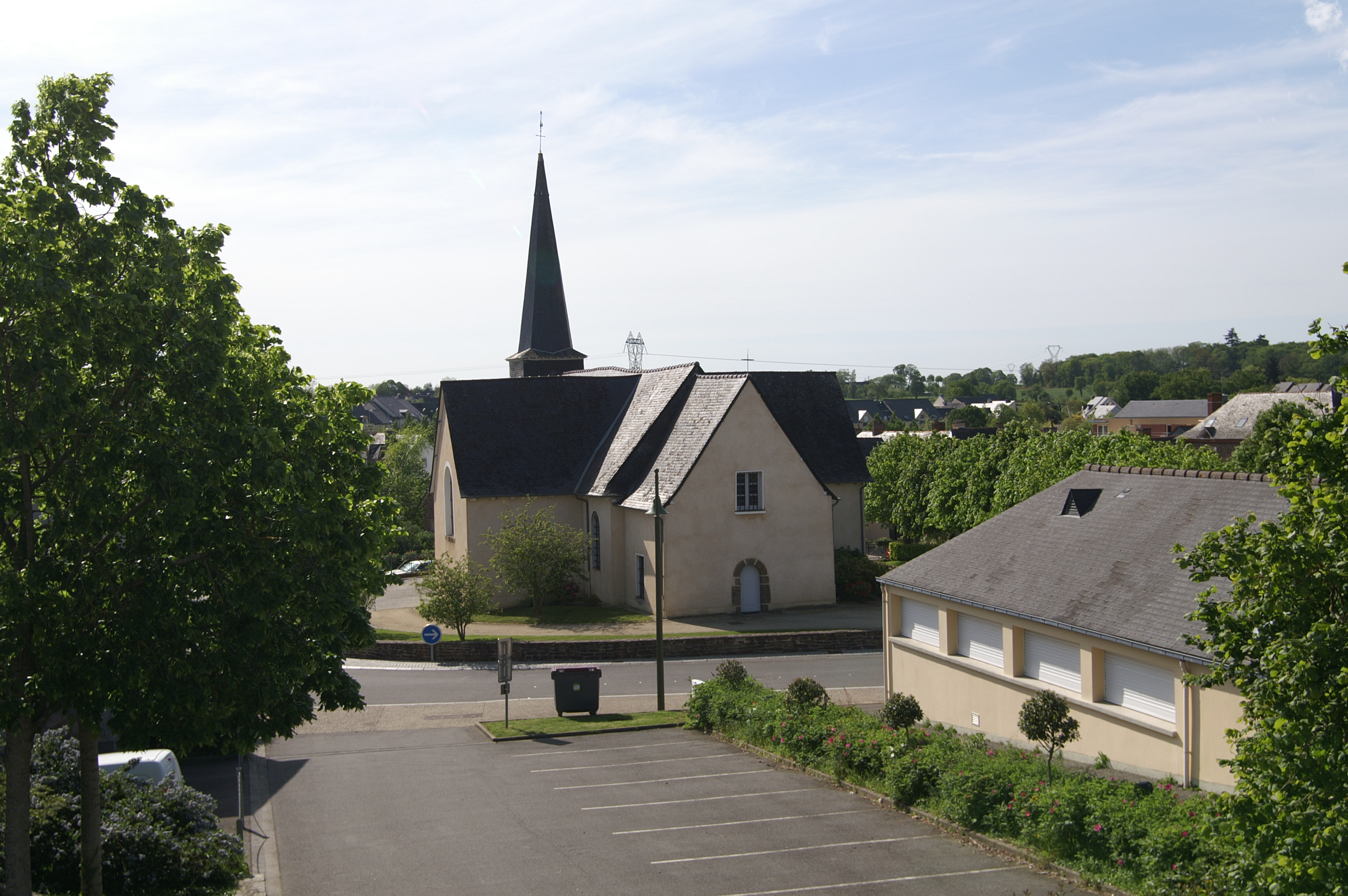 Église de Vezin-le-Coquet.